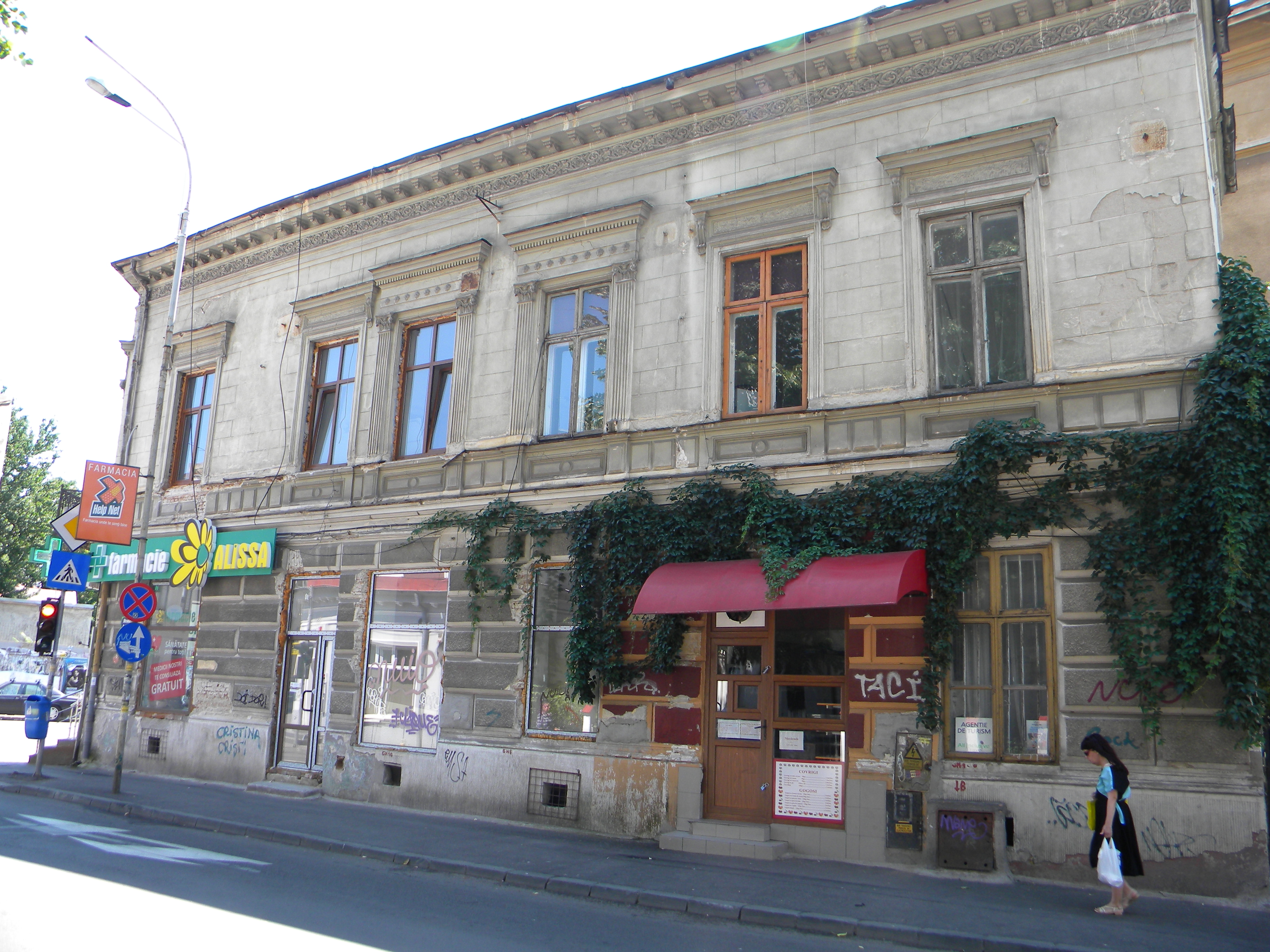 Bucuresti, Romania, Str. Batistei 20; Atelierul pictorului Nicolae Grigorescu; B-IV-m-B-20976